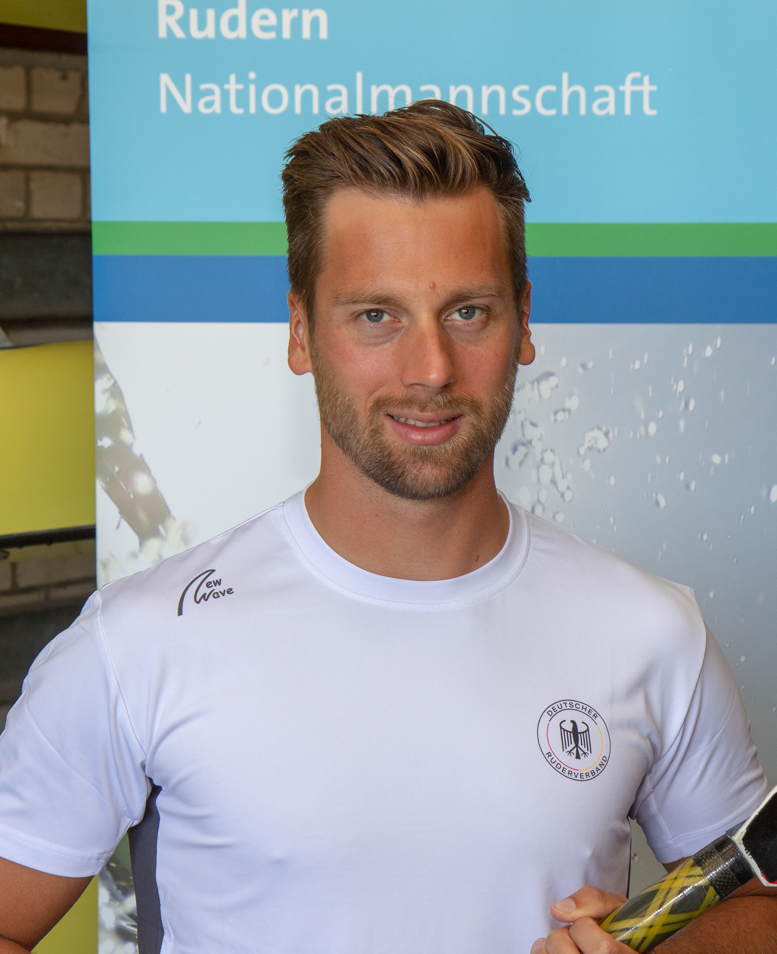 Lars Hartig beim Medientag des Deutschen Ruderverbandes in der Ruderakademie Ratzeburg am 22. August 2018.